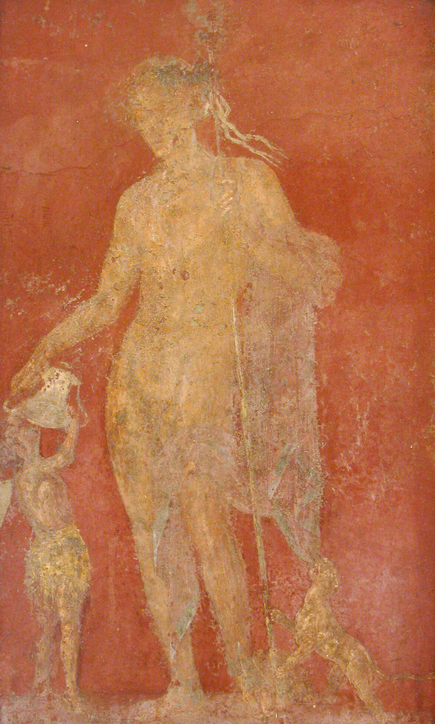 Dioniso e Satiro, Museo archeologico nazionale di Napoli (inv. nr. 9268). Da Pompei, Casa dei Dioscuri